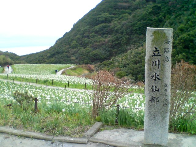 Narcissuses at Tachikawa Suisen-kyo (立川水仙郷), Awaji Island, Hyogo, Japan